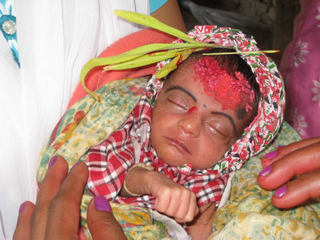 ダサイン祭りは人生の最高の楽しみをお祝うネパール最大のお祭り